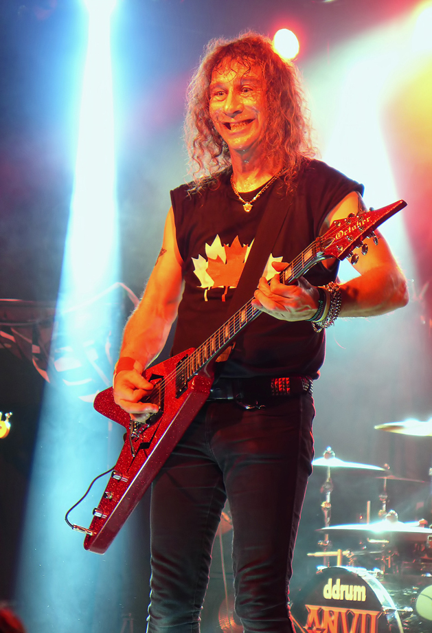 Anvil band